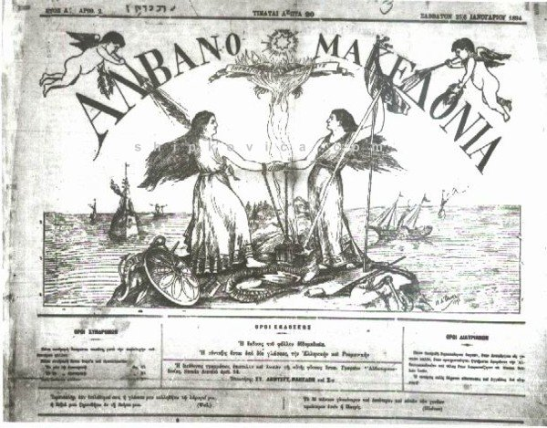 Албано-Мачедония